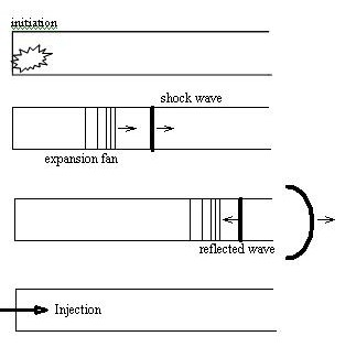 Décrit le principe de fonctionnement d'un PDE